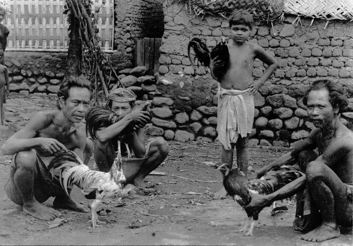 Foto. Bali, groepje dorpsbewoners met hun vechthanen.